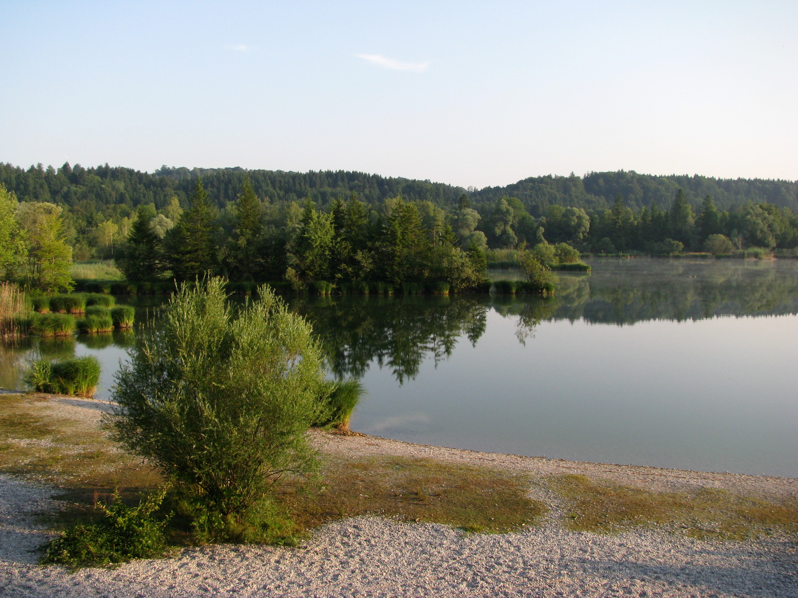 Ickinger Weiher am Morgen